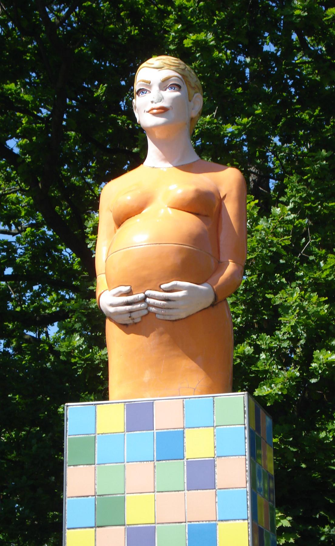 Leiderdorp, Heinsiuslaan. Kunstwerk "Zwangere vrouw" van Berry Holslag. The Netherlands. The photographical reproduction of this work is covered under the article 18 of the Dutch copyright law, which states that “it is not an infringement of copyright to reproduce and publish pictures of a work, as meant in article 10, first paragraph, under 6°[1] or of an architectural work as meant in article 10, first paragraph, under 8°[2], which are made to be permanently located in a public place, as long as the work is depicted as it is located in the public space. Where incorporation of a work in a compilation is concerned, not more than a few of the works of the same author may be included”. [1] drawings, paintings, works of architecture and sculpture, lithographs, engravings and the likes [2] drafts, sketches and three-dimensional works relating to architecture, geography, topography or other sciences Note that photographs are not included in Item 6. They are separately listed at Item 9 and are therefore not covered by FOP. See COM:CRT/Netherlands#Freedom of panorama for more information. .